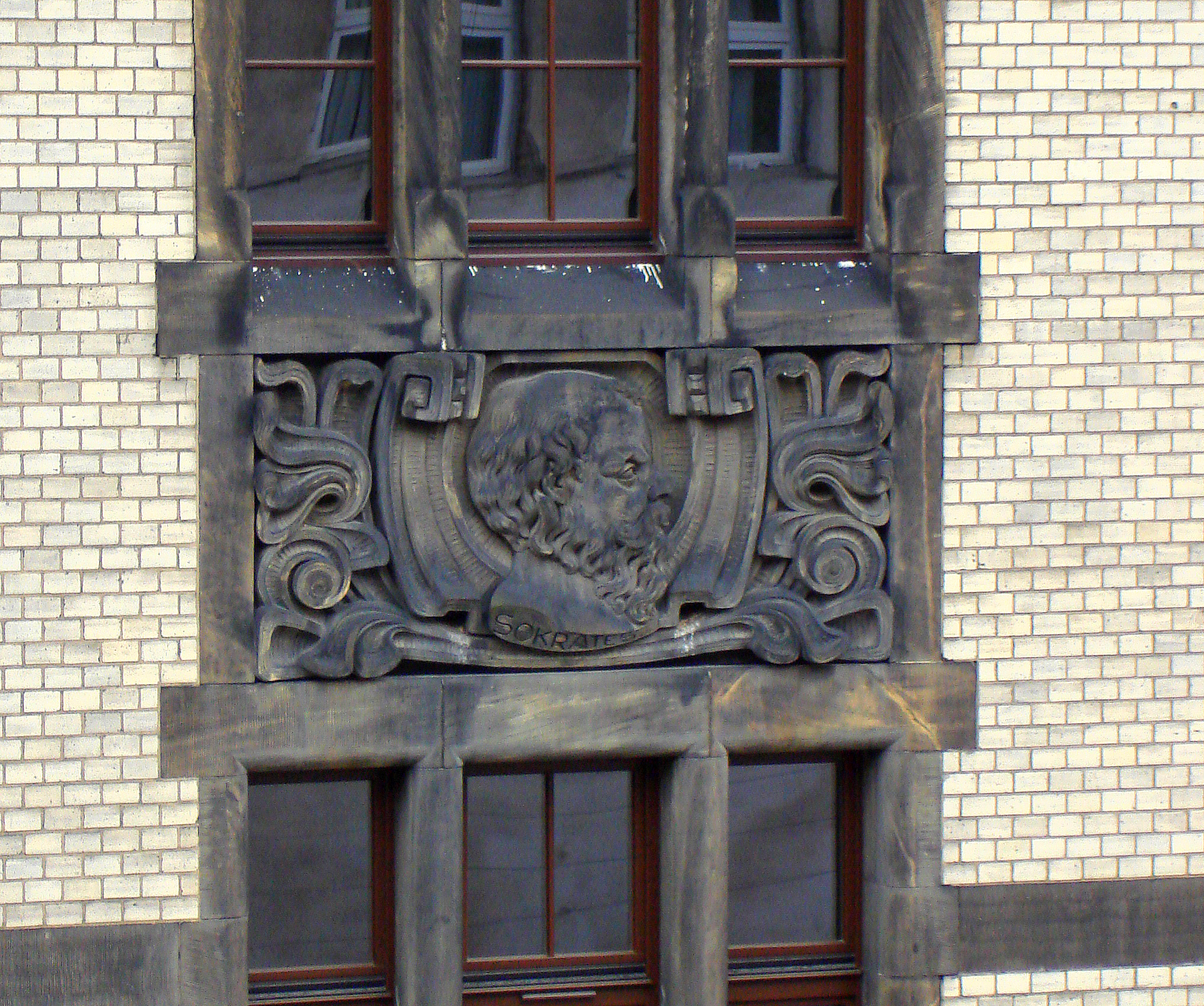 Wrocław, relief przedstawiający Sokratesa na elewacji budynku Uniwersytetu przy ul. Joannitów